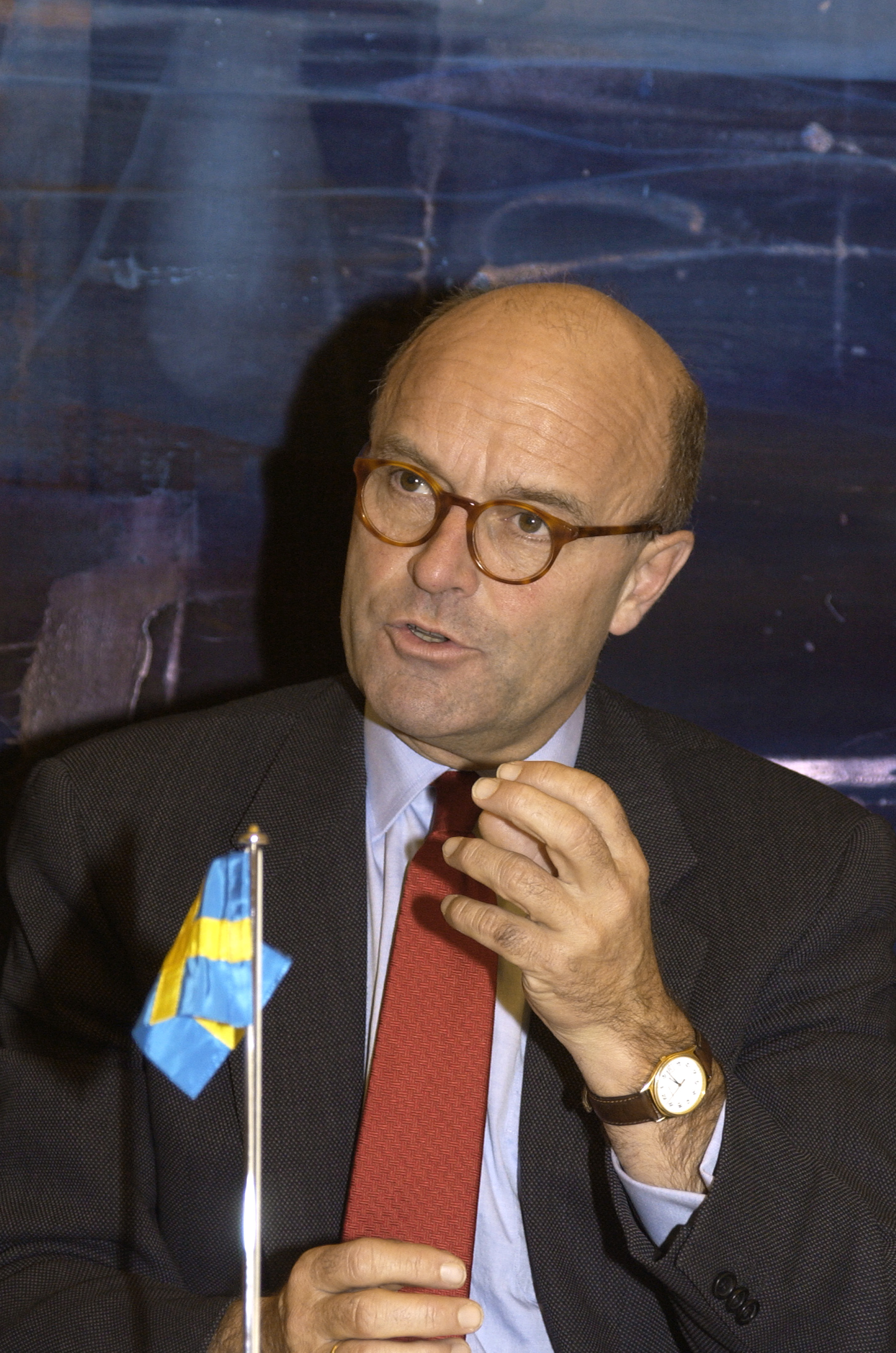 Gunnar Lund, statsråd finnansdepartementet, Sverige (Bilden är tagen vid Nordiska rådets session i Oslo, 2003)